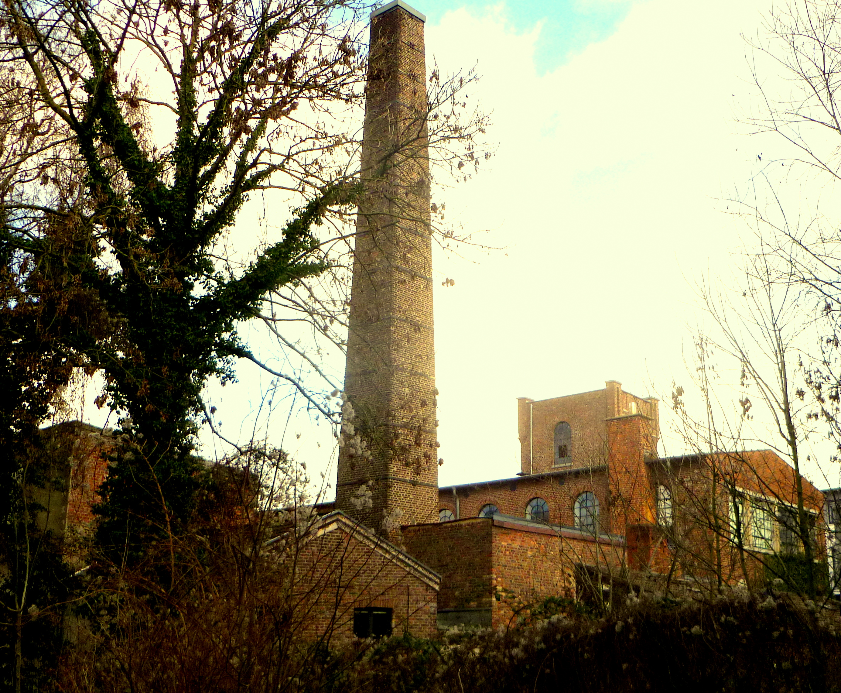 Ehem. Tuchfabrik Pastor/Neuwerk in Aachen (Rückansicht mit Makaroffturm und Schornstein)